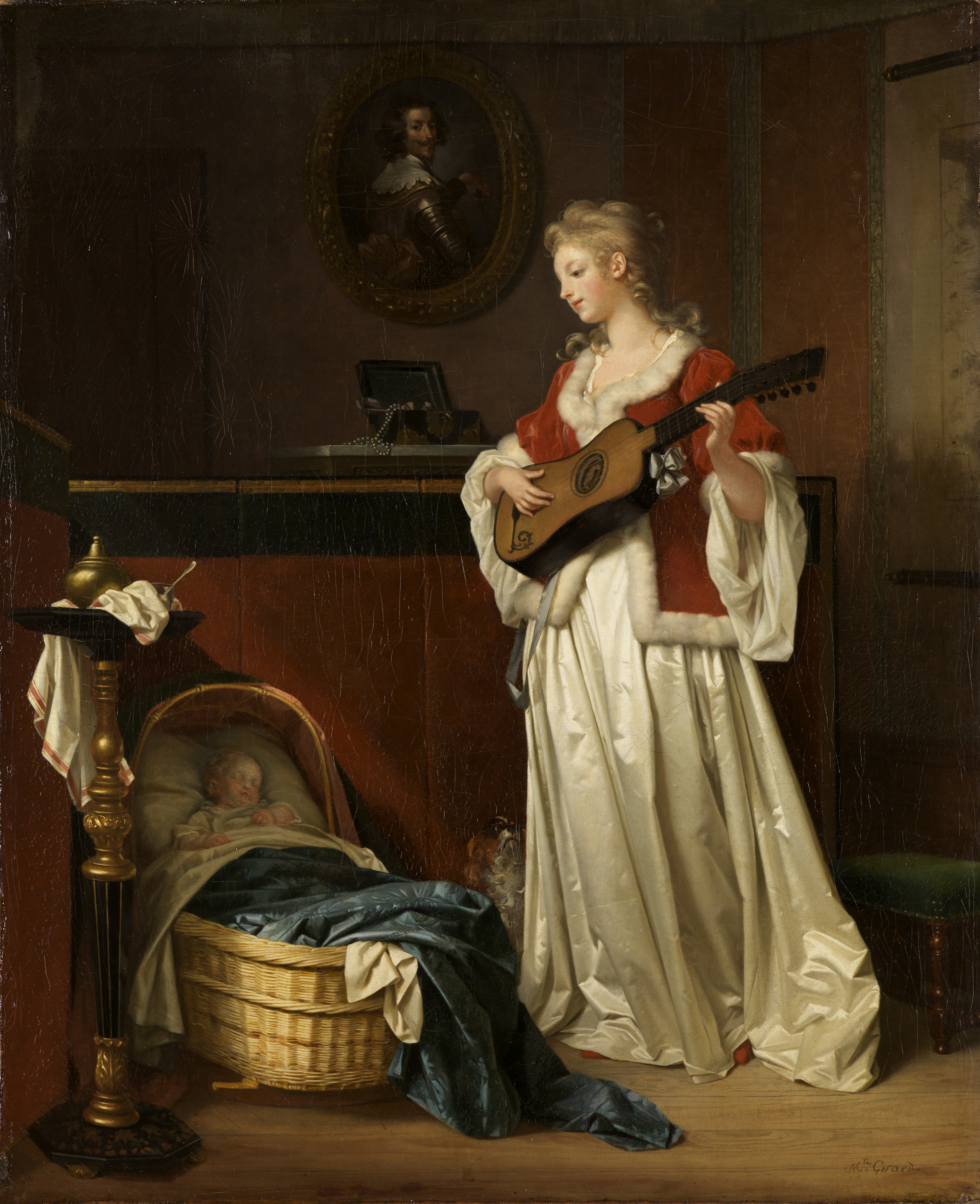 Sleep My Child